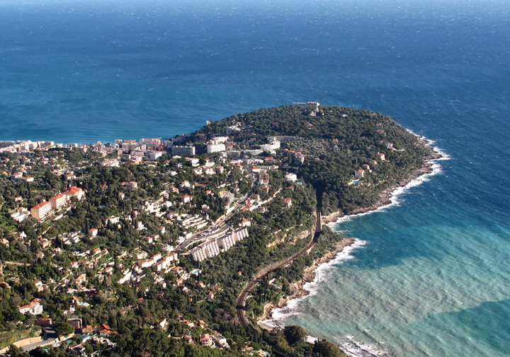 Cap Martin, PACA, France